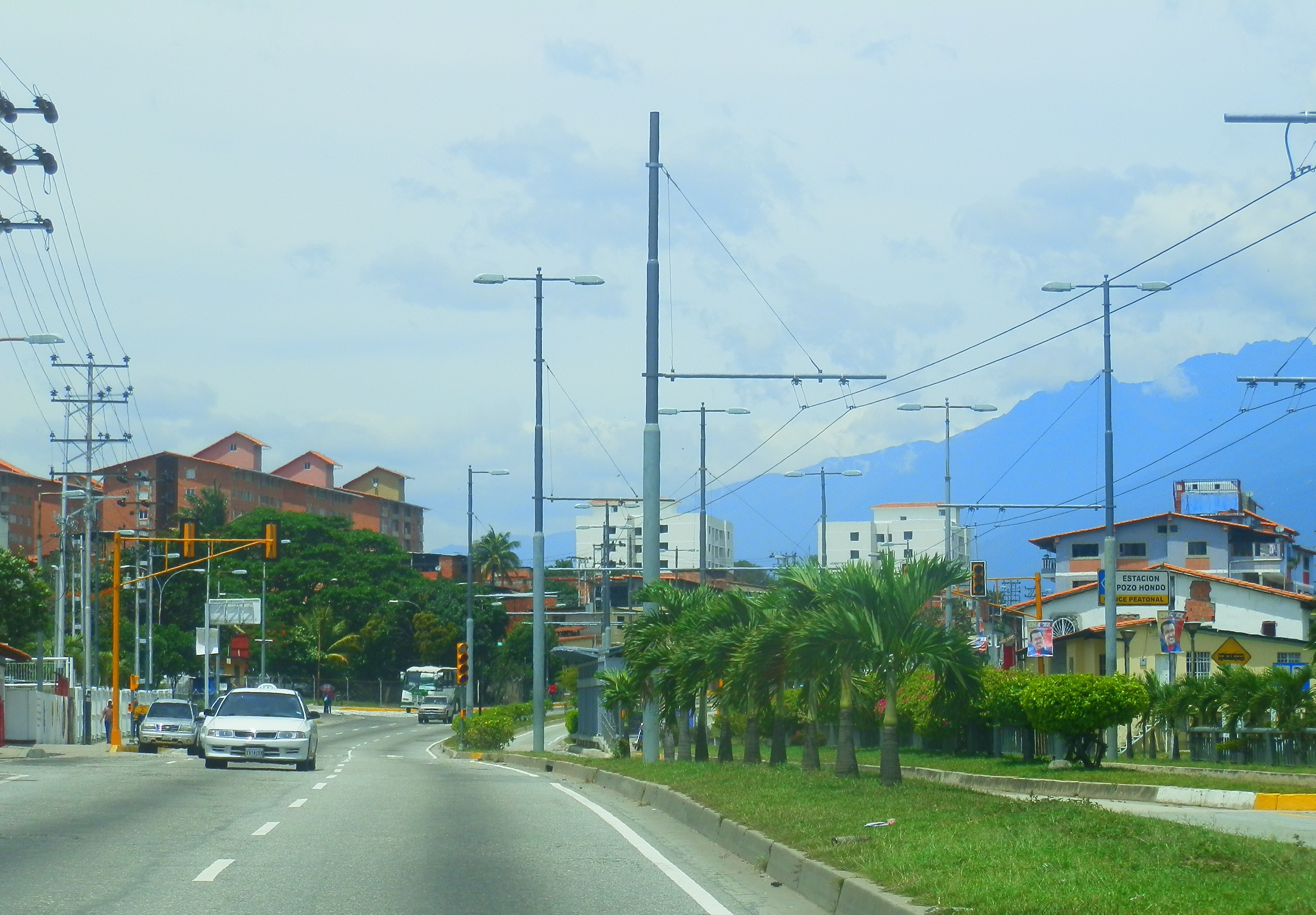 Zona de edificios en Mérida